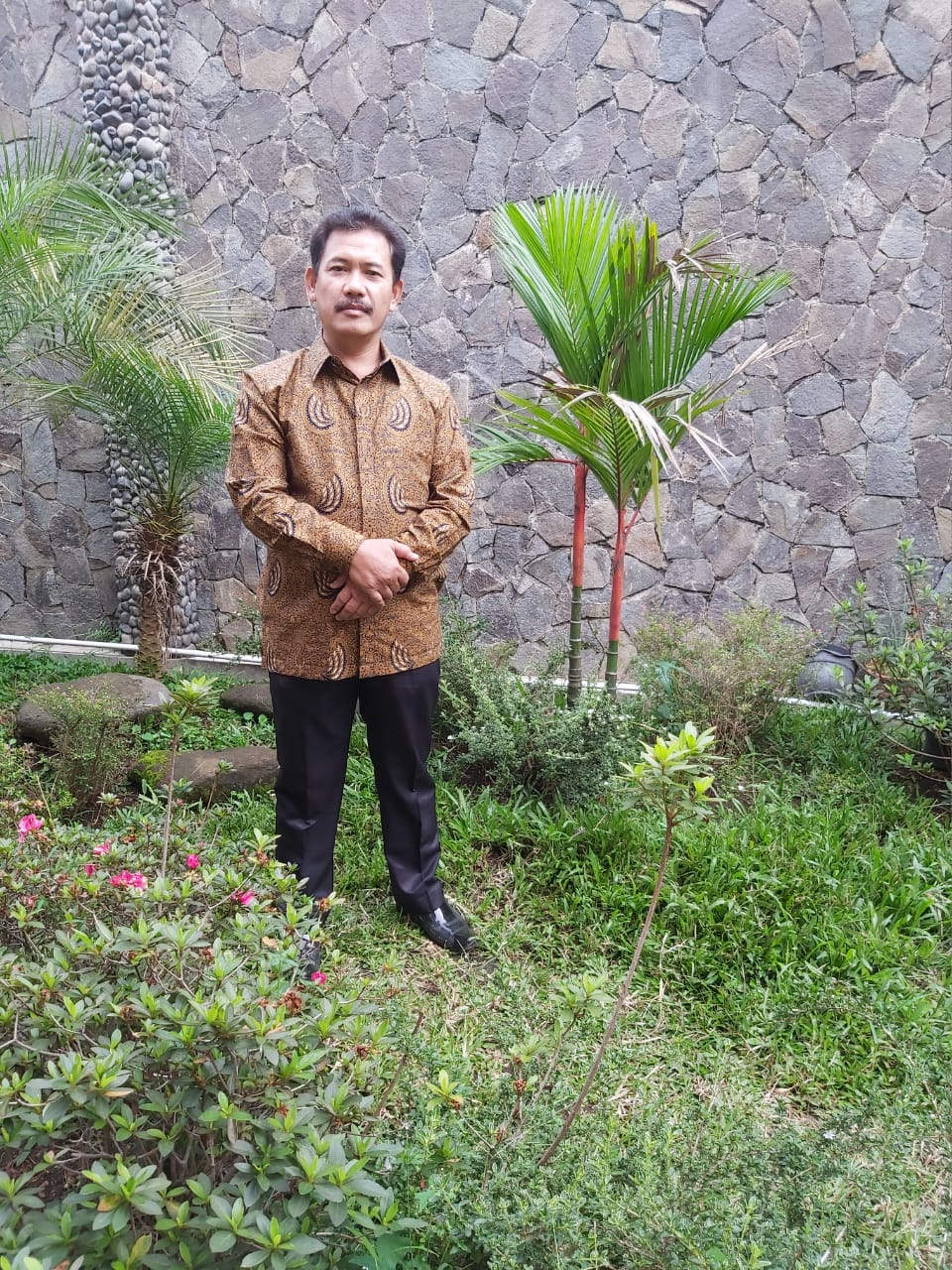 Ayep Rukmana, Kediaman Kabupaten Bandung